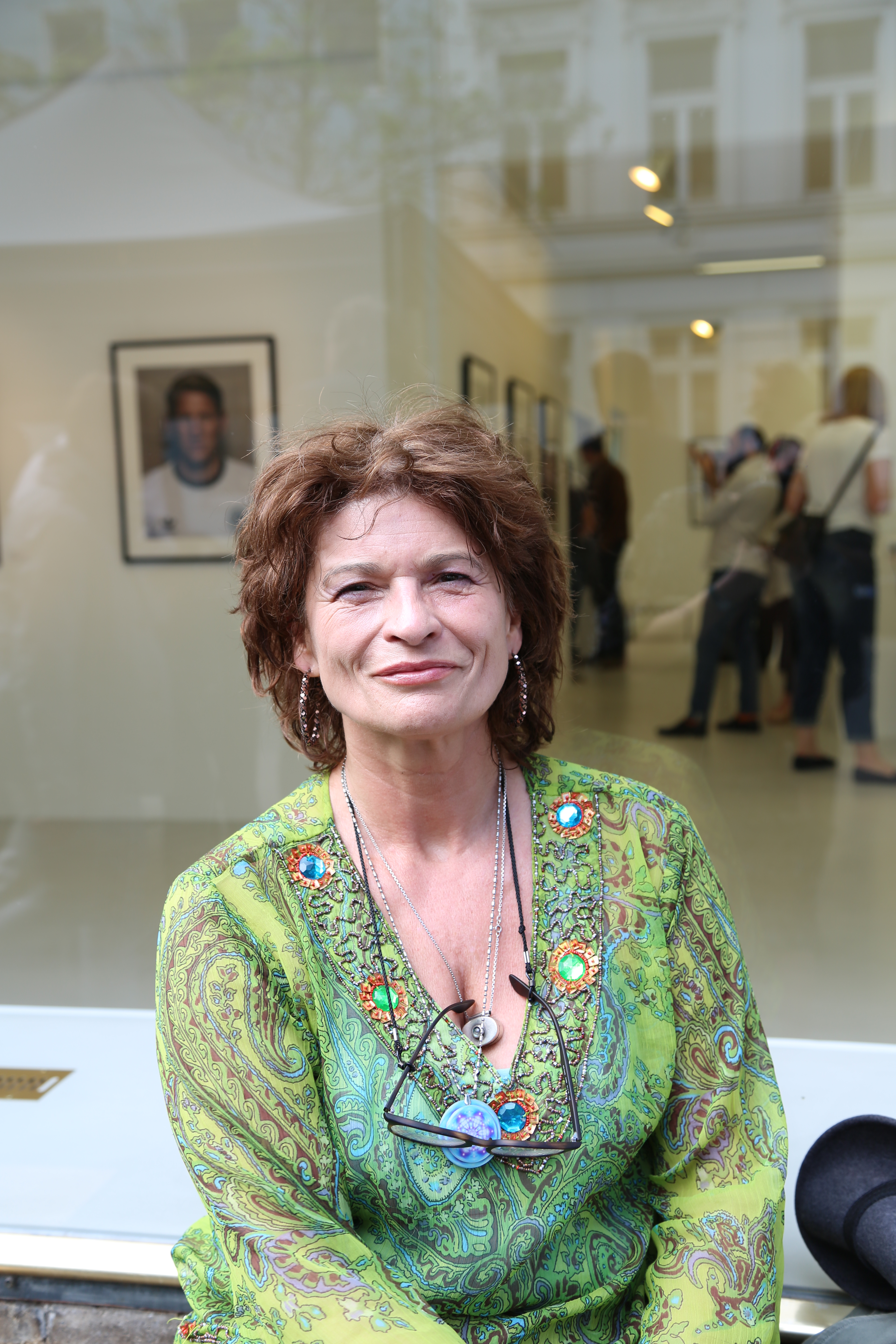 Gabrielle Scharnitzky bei der Eröffnung von Carsten Sanders Galerie "Heimat" am 13.05.2017 in Düsseldorf.